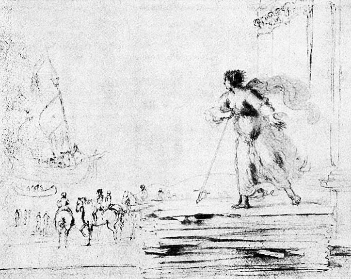 Suicidio di Didone